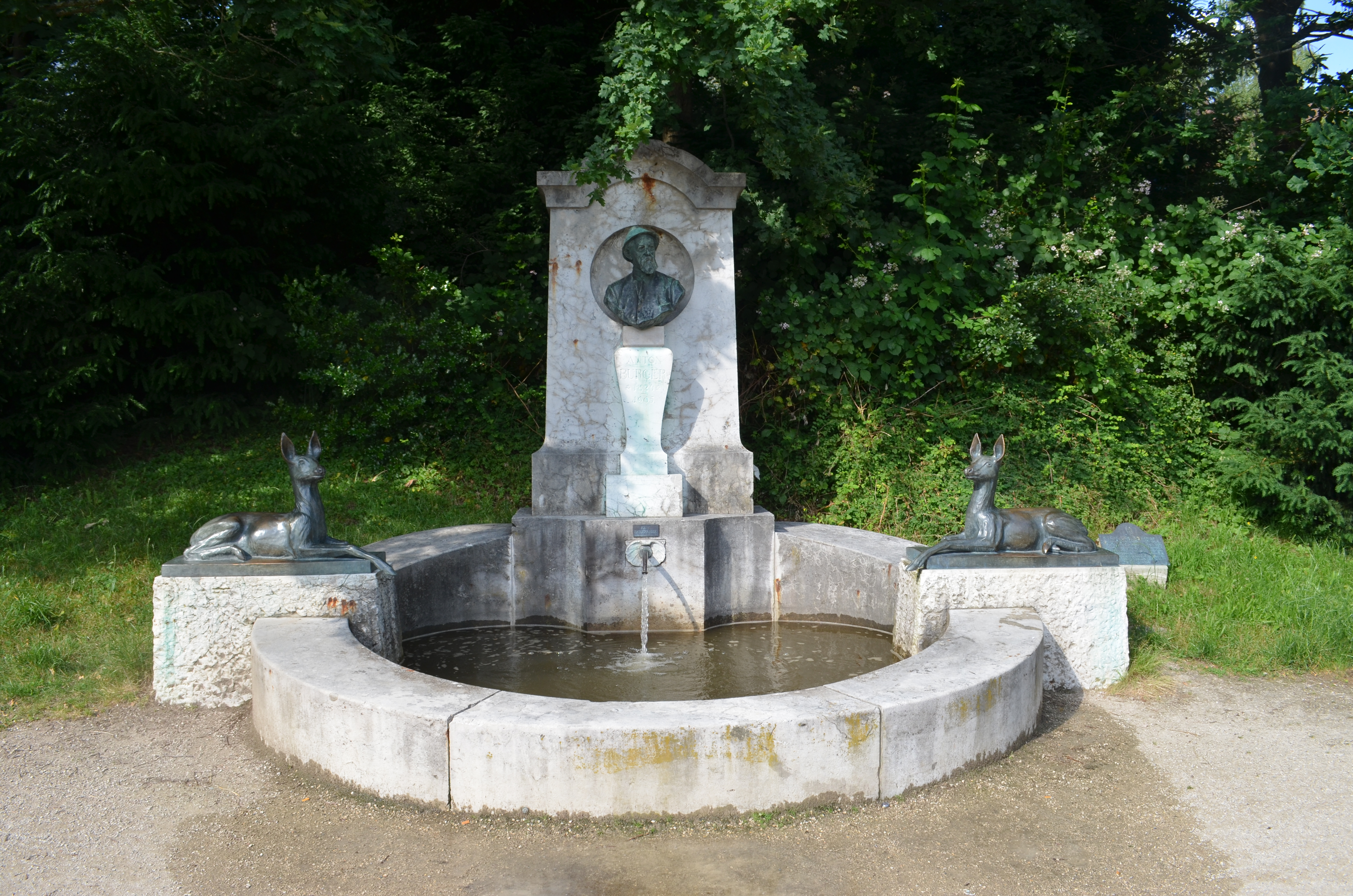 Kronberg, Victoriapark, Anton-Burger-Denkmal